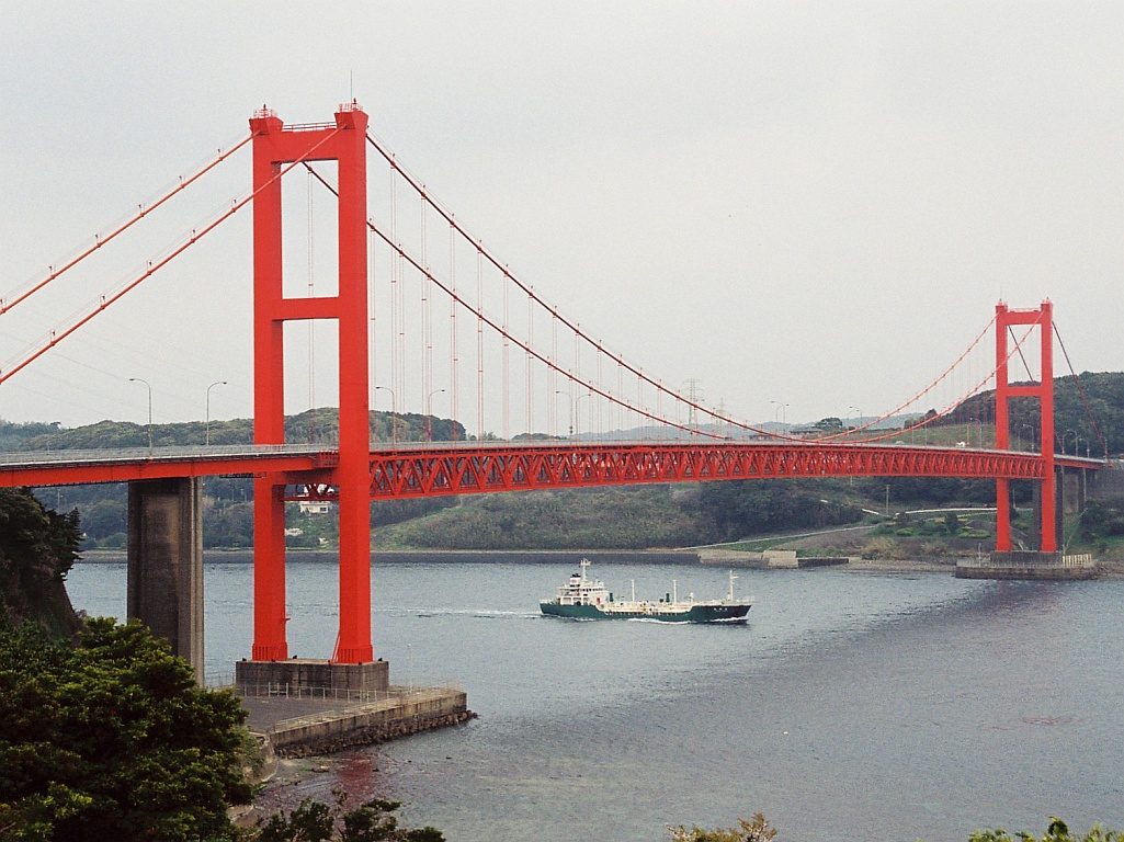 平戸瀬戸に架かる平戸大橋。平戸大橋有料道路として供用されている。（長崎県平戸市） Photo by Si-take. Apr.2000